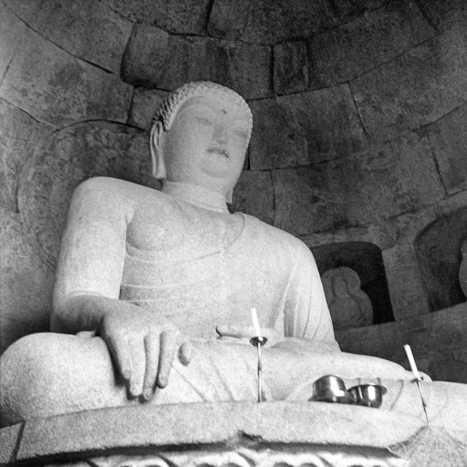 1954년 중학교 3학년 때 경주 수학여행 때 촬영함.